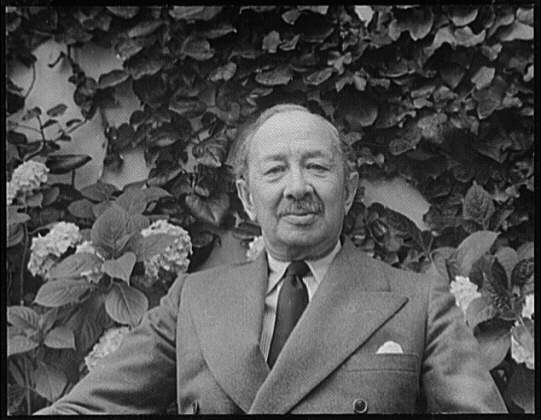 Reginald Turner Reginald Turner, 1935-06-24